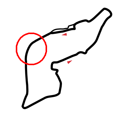 Autodromo Enzo e Dino Ferrari, Imola (1992 Layout) - Tamburello Highlighted